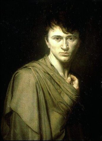 Alexandre-Denis Abel de Pujol, Self Portrait, 1806, Valenciennes, Musée de Beaux-Arts, Oil on canvas, 71x55.